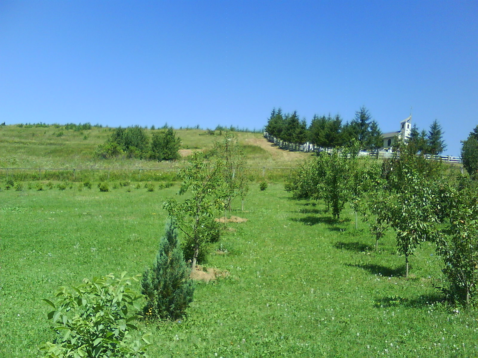 Kupres